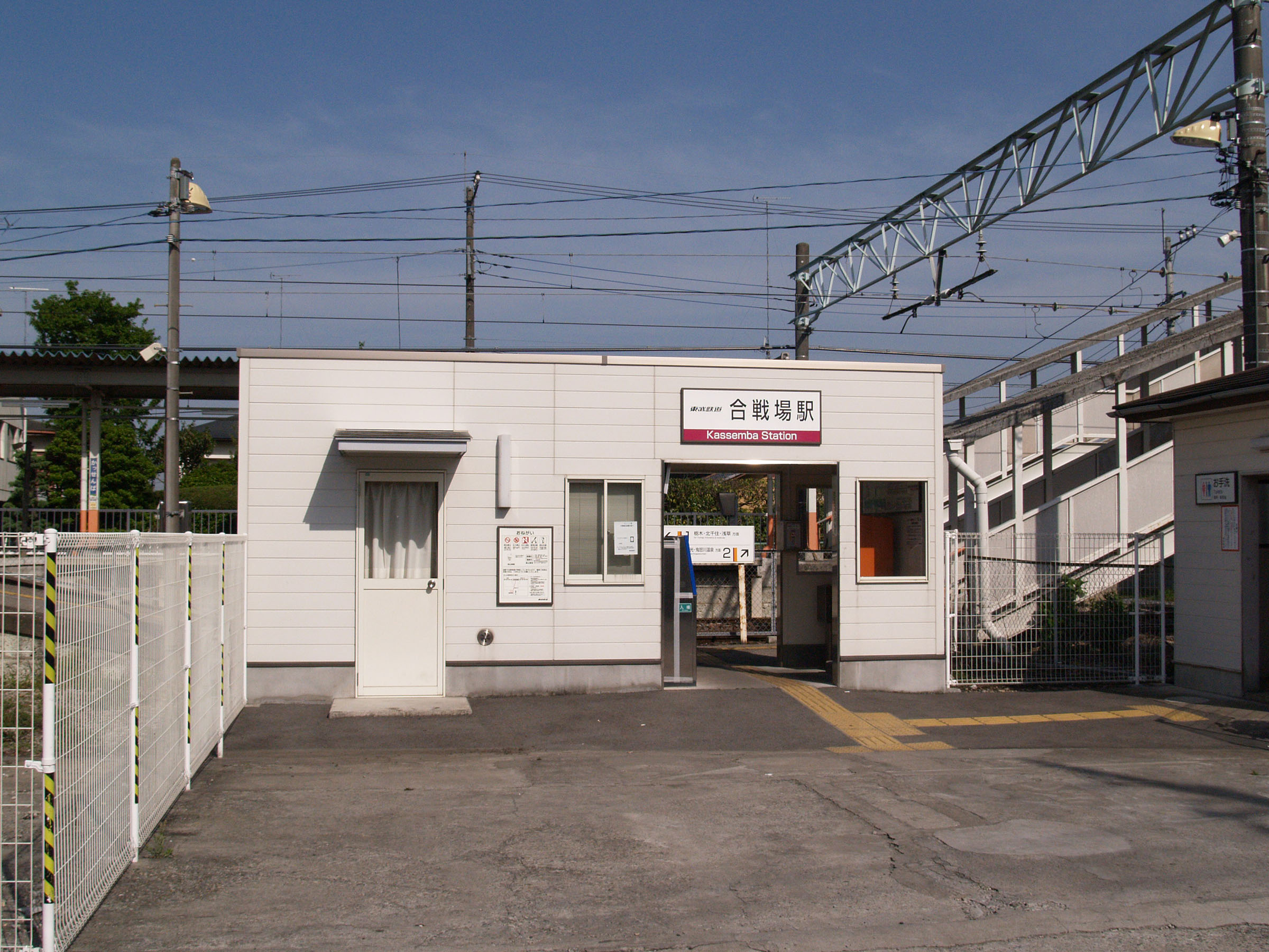 合戦場駅駅舎